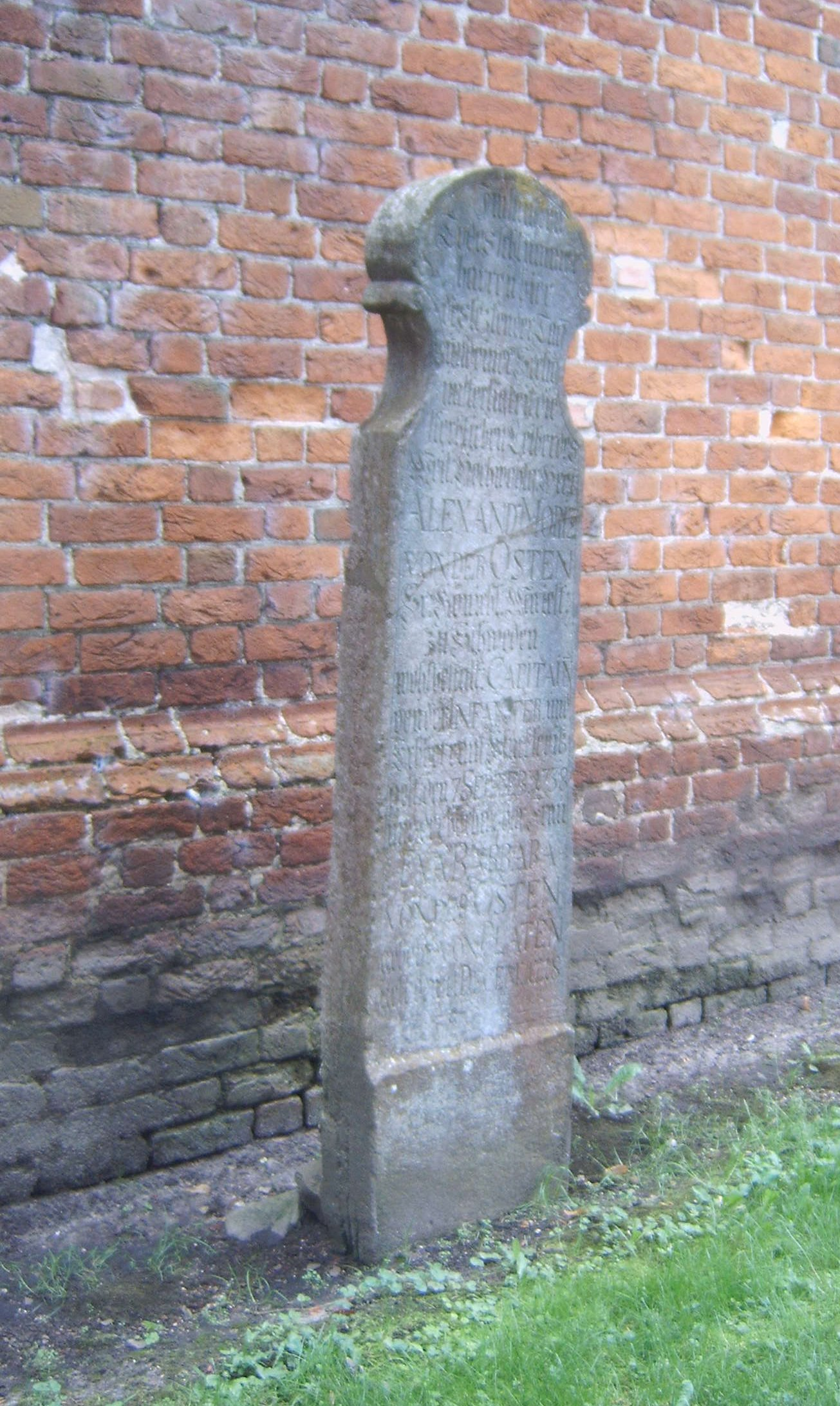 Sühnestein in Gingst, Rügen, Deutschland